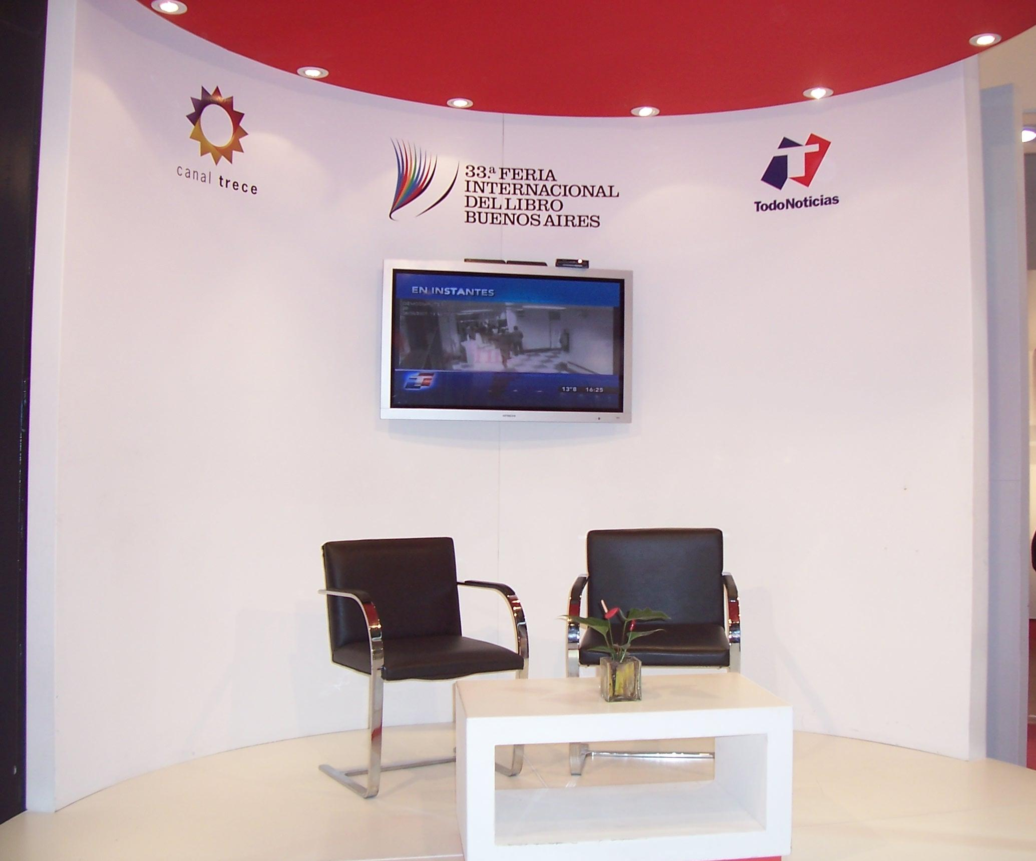 Stand de Canal 13 y Todo Noticias (TN) en la 33° Feria Internacional del Libro en la ciudad de Buenos Aires (Argentina).